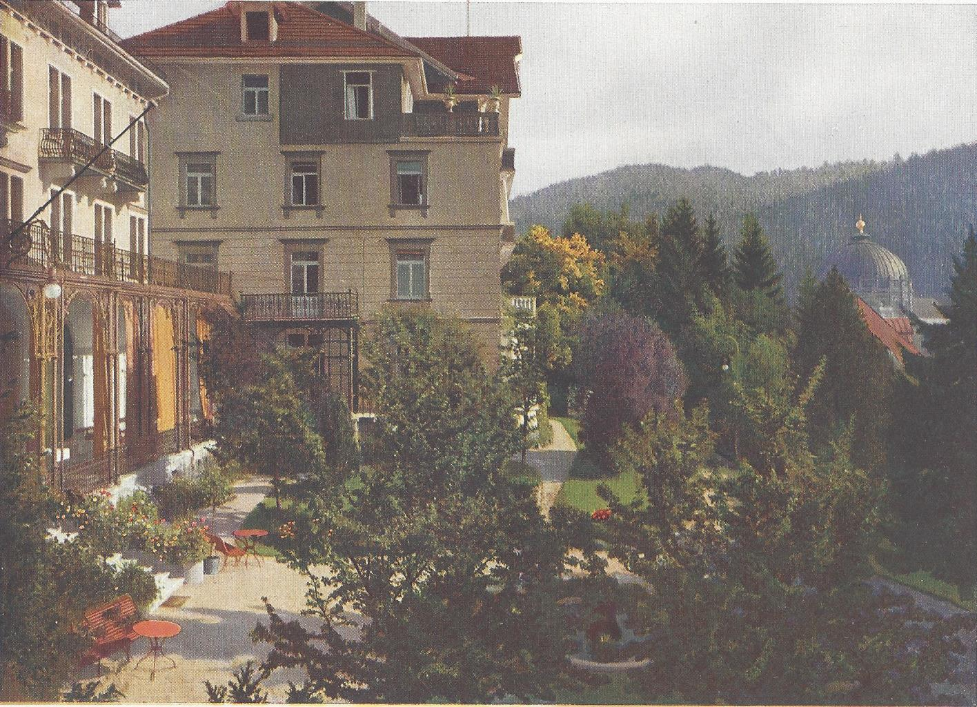 Sanatorium St. Blasien, Garten, Aufnahme 1914 aus: Sanatorium St. Blasien Heilanstalt für Lungenkranke, C.A. Wagner Freiburg